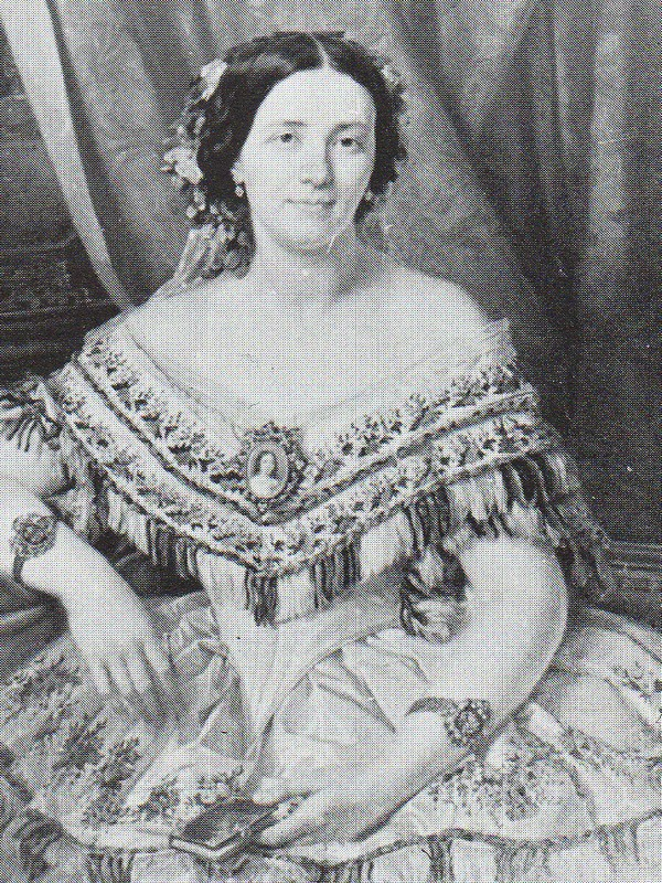 Baronne de Ladoucette